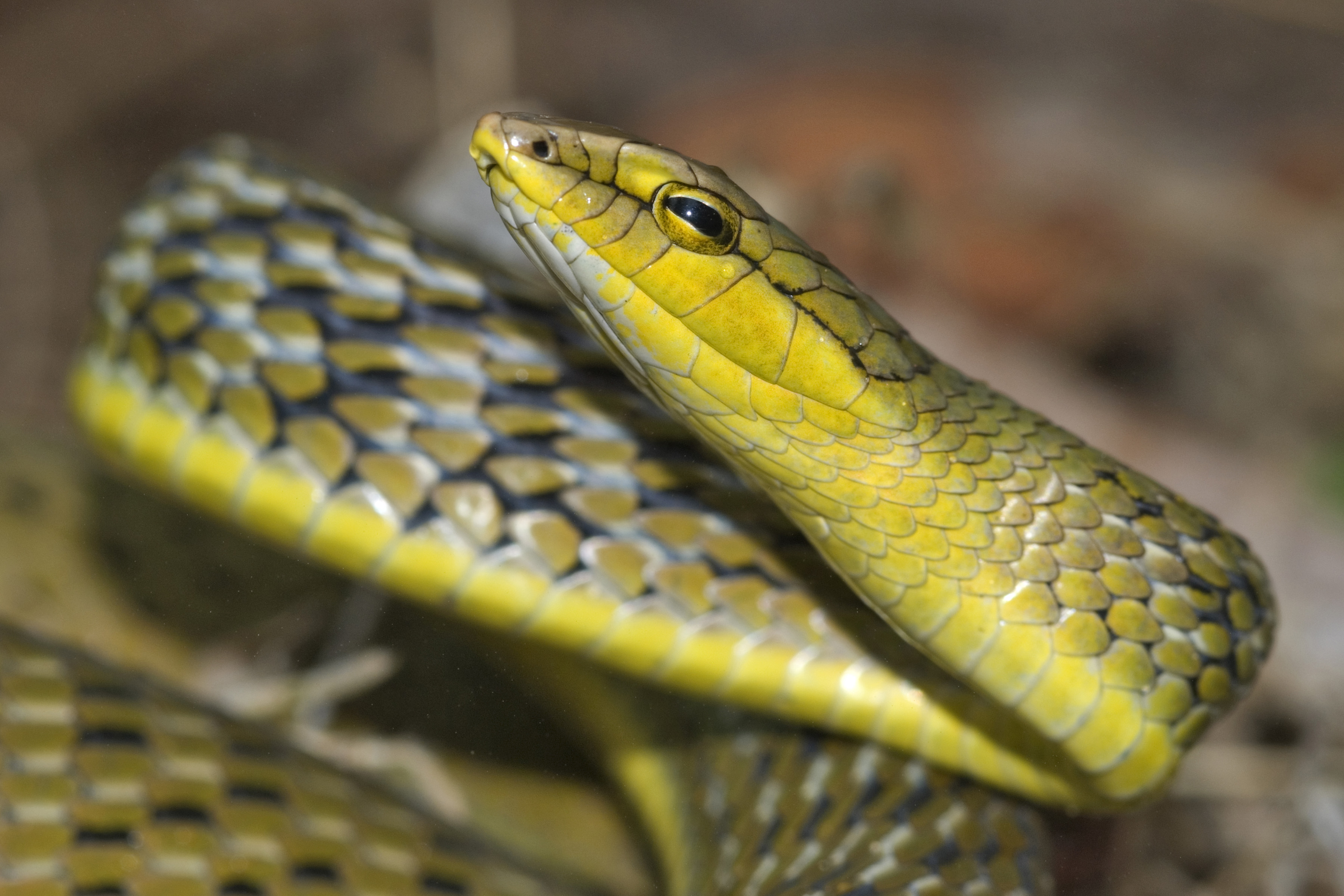 ചോലപ്പച്ചോലൻ‍